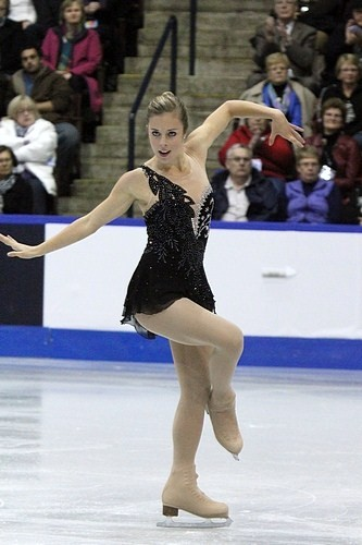 Эшли Вагнер на 2011 Skate Canada International